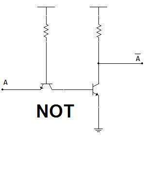 Puertas NOT con transistores